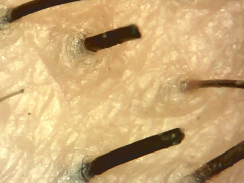 Particolare di peli di barba